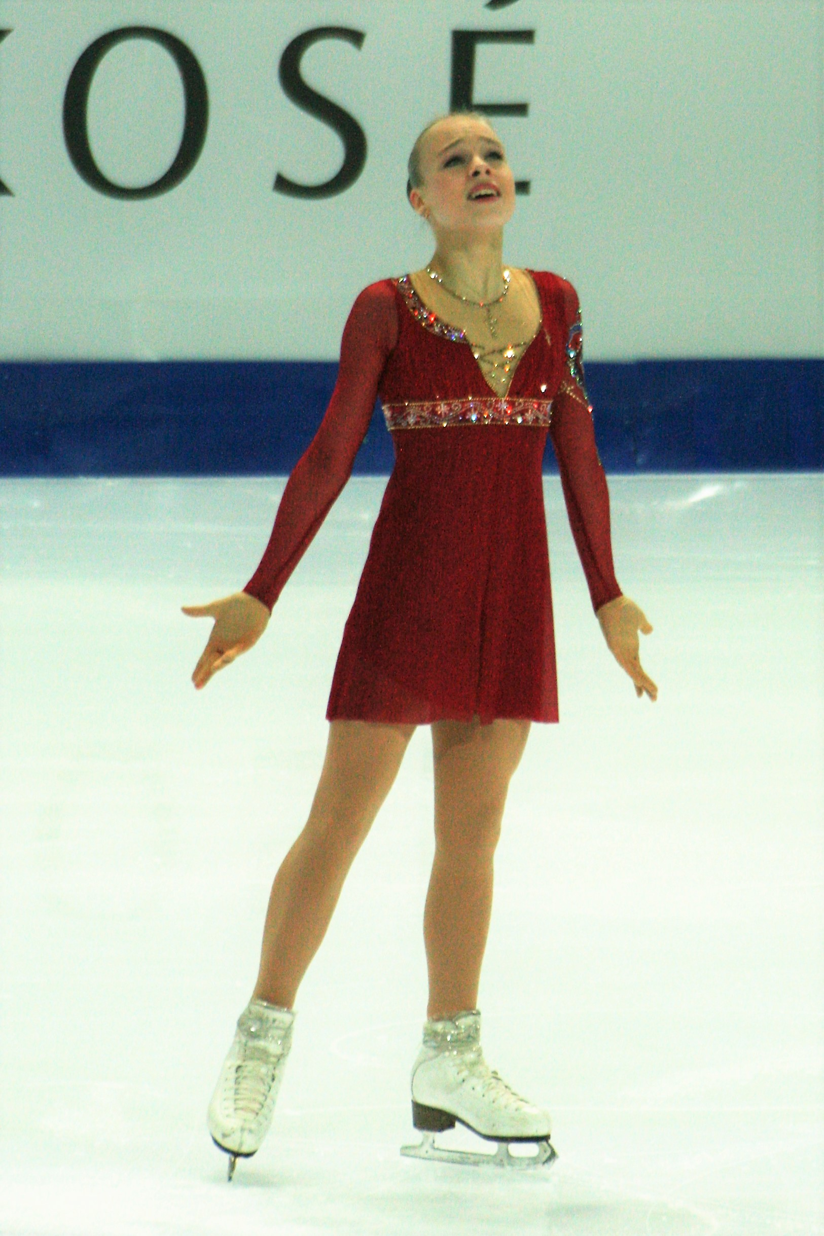 Анастасия Губанова (Россия) на финале Гран-при по фигурному катанию среди юниоров 2016-2017